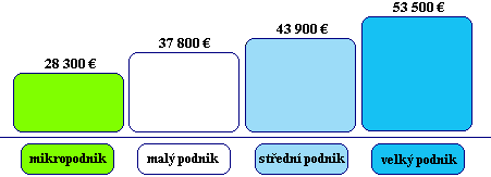 Obr. 3 Zdánlivá produktivita práce na jednoho zaměstnance v rove 2003 v EU. Zdroj dat [2].